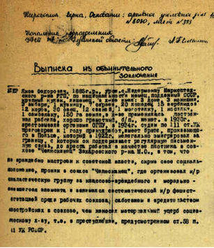 Anklageschrift gegen Jakow Maier, 1935 „MAIER, Jakow Fedorowitsch, [...] besaß 3 Häuser, 3 Pferdeställe, 3 Getreidespeicher, 1 Schmiede, 7 Scheunen, 20 Pferde, 15 Kamele, 12 Kühe, 30 Schafe, 12 Schweine, 1 Dreschmaschine, 1 Mähmaschine, 1 Mähbinder, 150 h Boden [...]; Er hat einen Bruder, der 1922 illegal nach Polen emigriert ist und mit dem er in regelmäßigem Briefkontakt steht. [...] Unter den Arbeitern der Sowchose betrieb er systematisch konterrevolutionär- faschistische Agitation und verübte Sabotage- und Schädlingsakte auf Neubauten der Sowchose. Damit fügte er der sozialistischen Wirtschaft Schaden zu, beging also ein Verbrechen nach dem Paragrafen 58 [...] des Strafgesetzbuchs der RSFSR.“ 1929 ist Jakow Fridrichowitsch Maier (1885–1943) Opfer der Entkulakisierung. Sein gesamter Besitz wird konfisziert, ihm wird das Wahlrecht entzogen. 1930 erfolgt die Ausweisung aus seinem Dorf. 1934 wird Maier zu Zwangsarbeit verurteilt. 1935 folgt die Verurteilung zu zehn Jahren Haft wegen angeblicher Spionage und konterrevolutionärer Tätigkeit. 1943 stirbt er im Gulag. (Quelle)